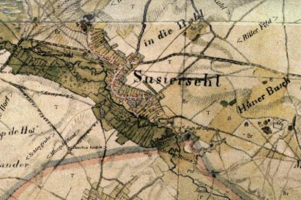 Kartenaufnahme der Rheinlande 1804/05